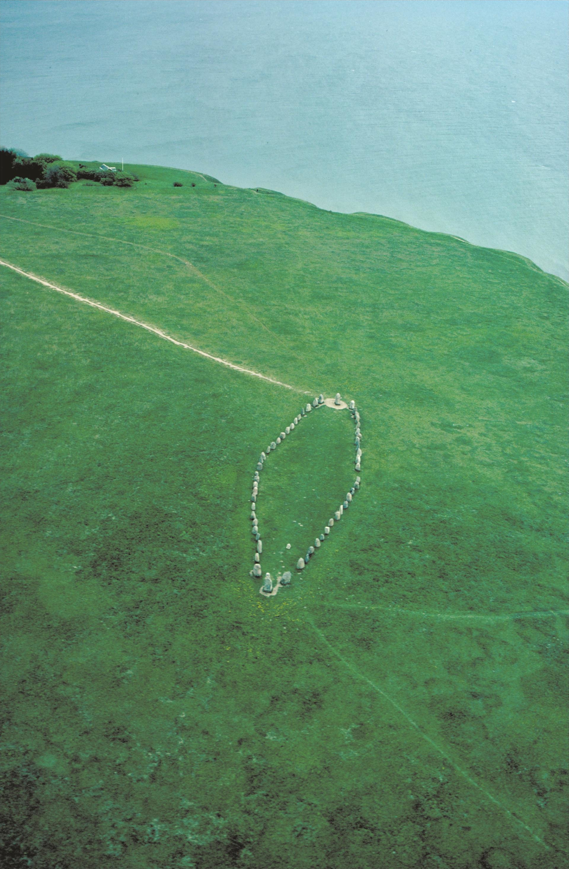 Skeppssättning. Bilden troligen från omkring 1960. Motiv: Ales stenar Nyckelord: Flygbilder, Raä-Fastigheter, Riksintressen Kategori: Stenkrets/domarring/skeppssättning Skeppssättning. Bilden troligen från omkring 1960.